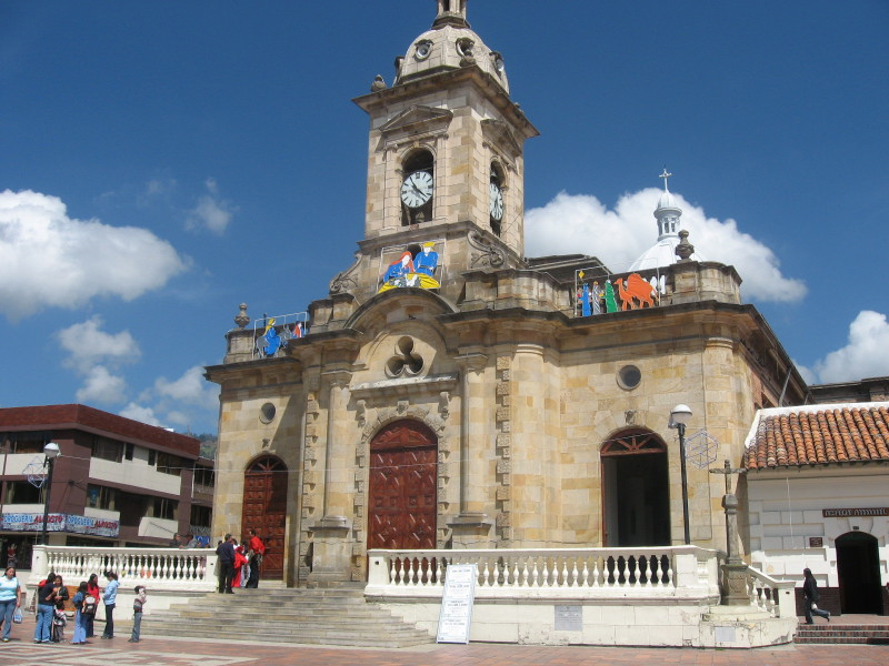 catedral de Paipa (Boyaca) - Colombia.